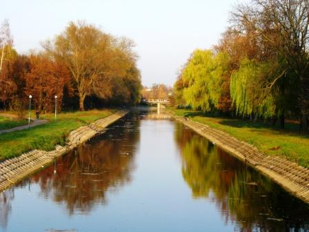 Річка Остер.